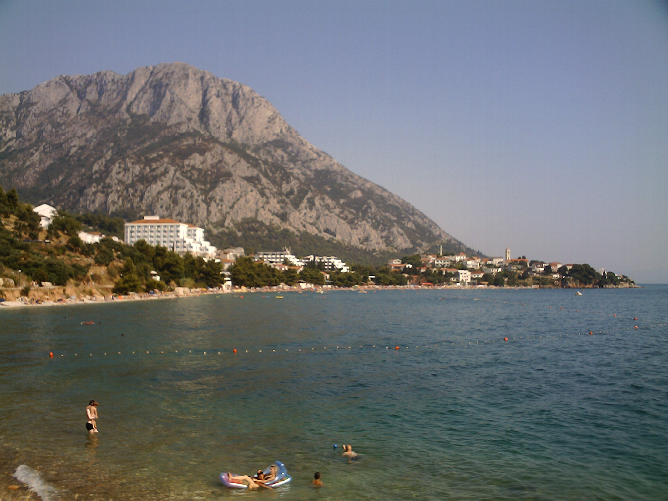 Blick auf Gradac